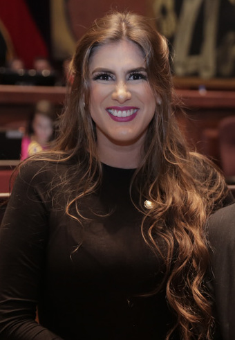 Tema: Primera Sesión Parlamentaria de Posesión de las y los Asambleístas para el Período Legislativo 2017-2021. Fotografía: Alberto Romo/Asamblea Nacional